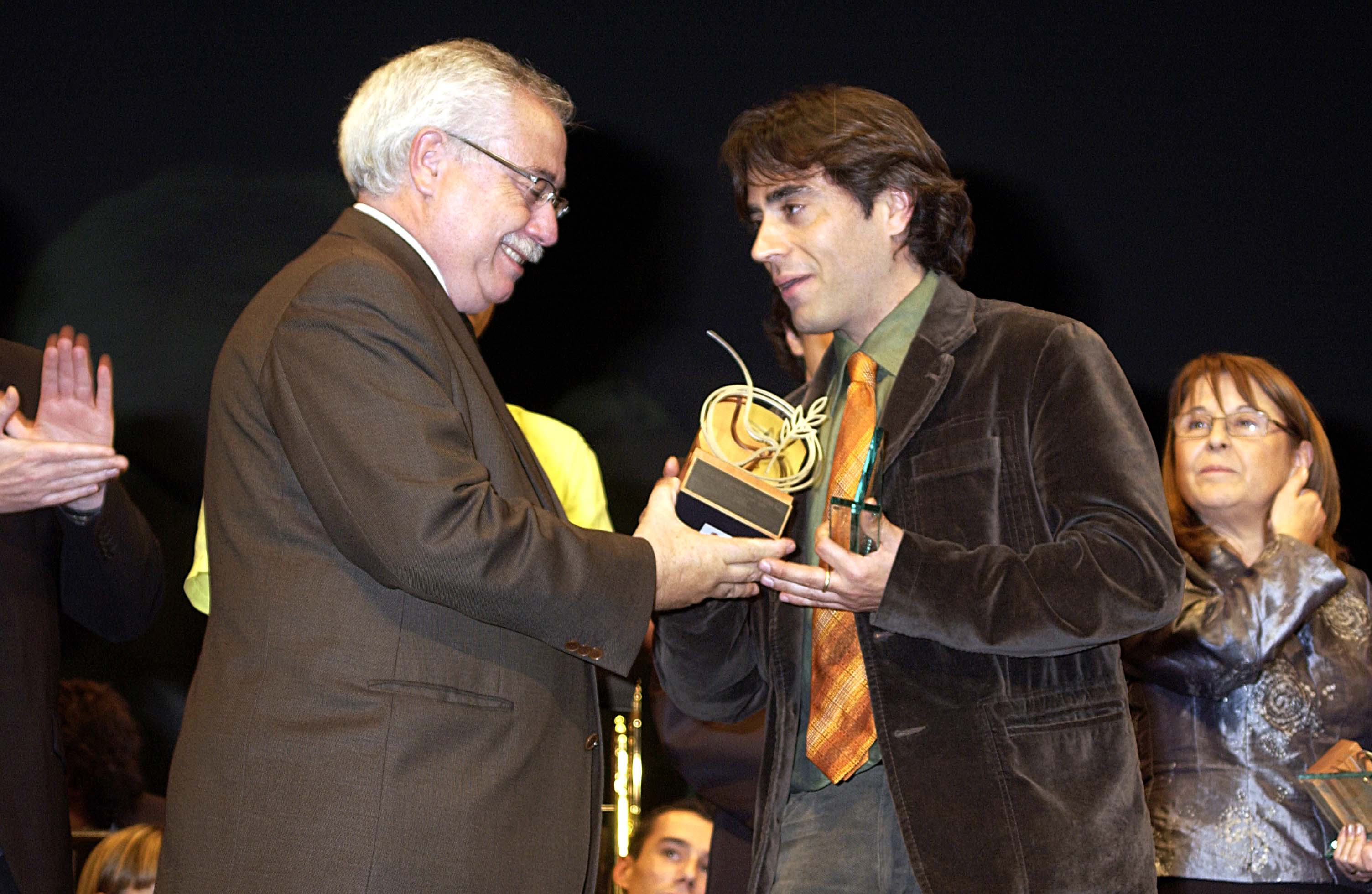 Sardana de l'Any 2007 - Lliurament del primer premi a Joan Segura